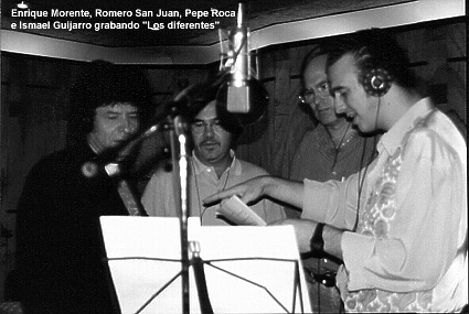 Producción del fonograma contra la xenofóbia "Los Diferentes"